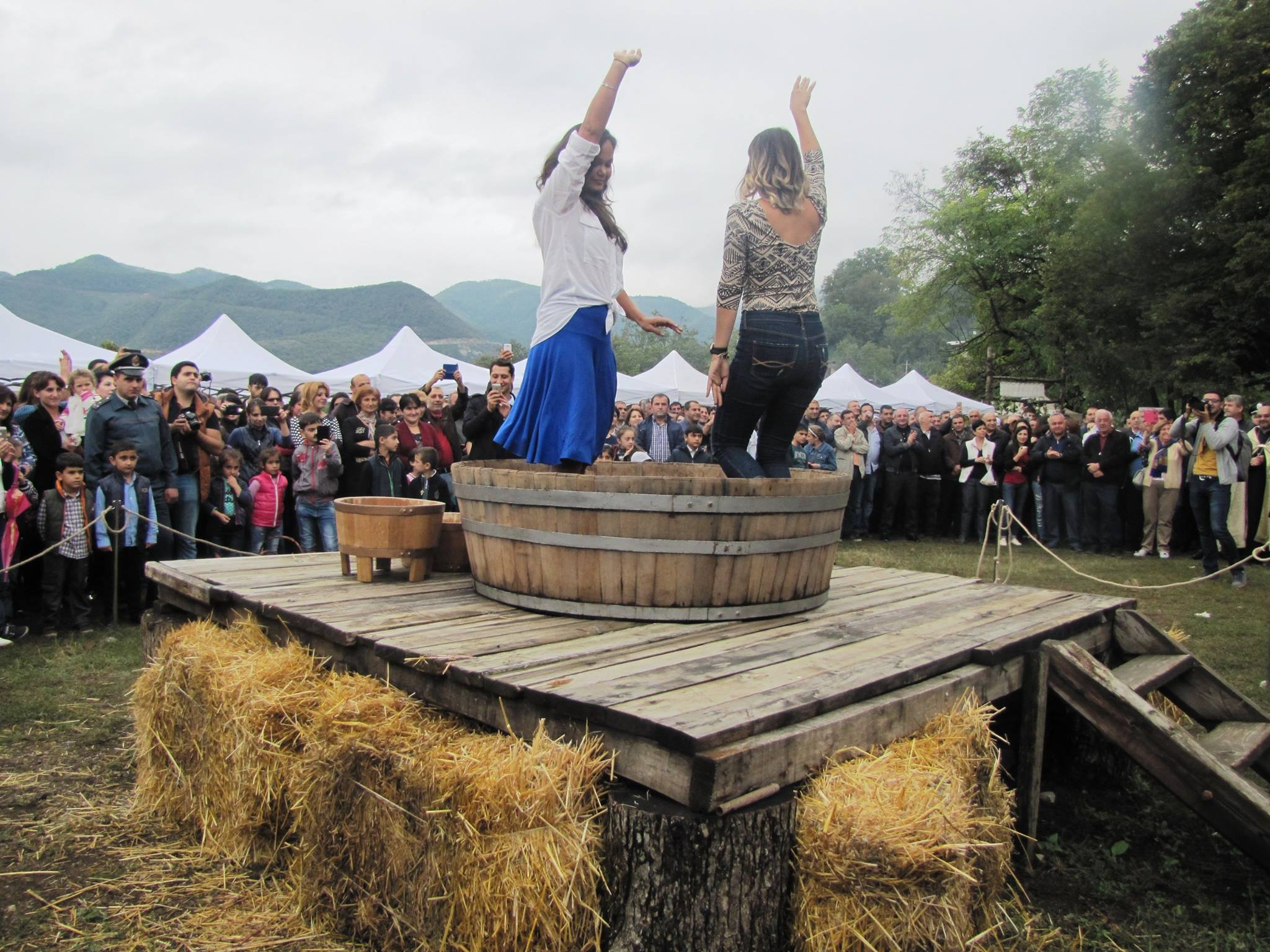 Գինու փառատոն